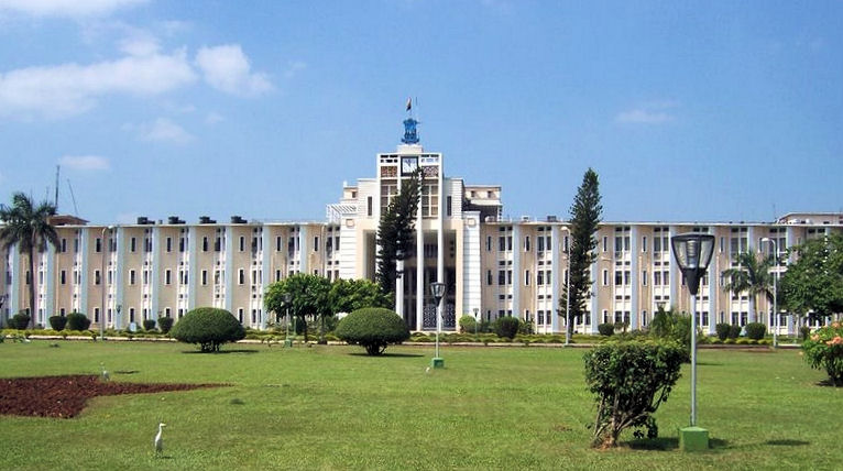 ORISSA SECRETARIAT, BHUBANESWAR